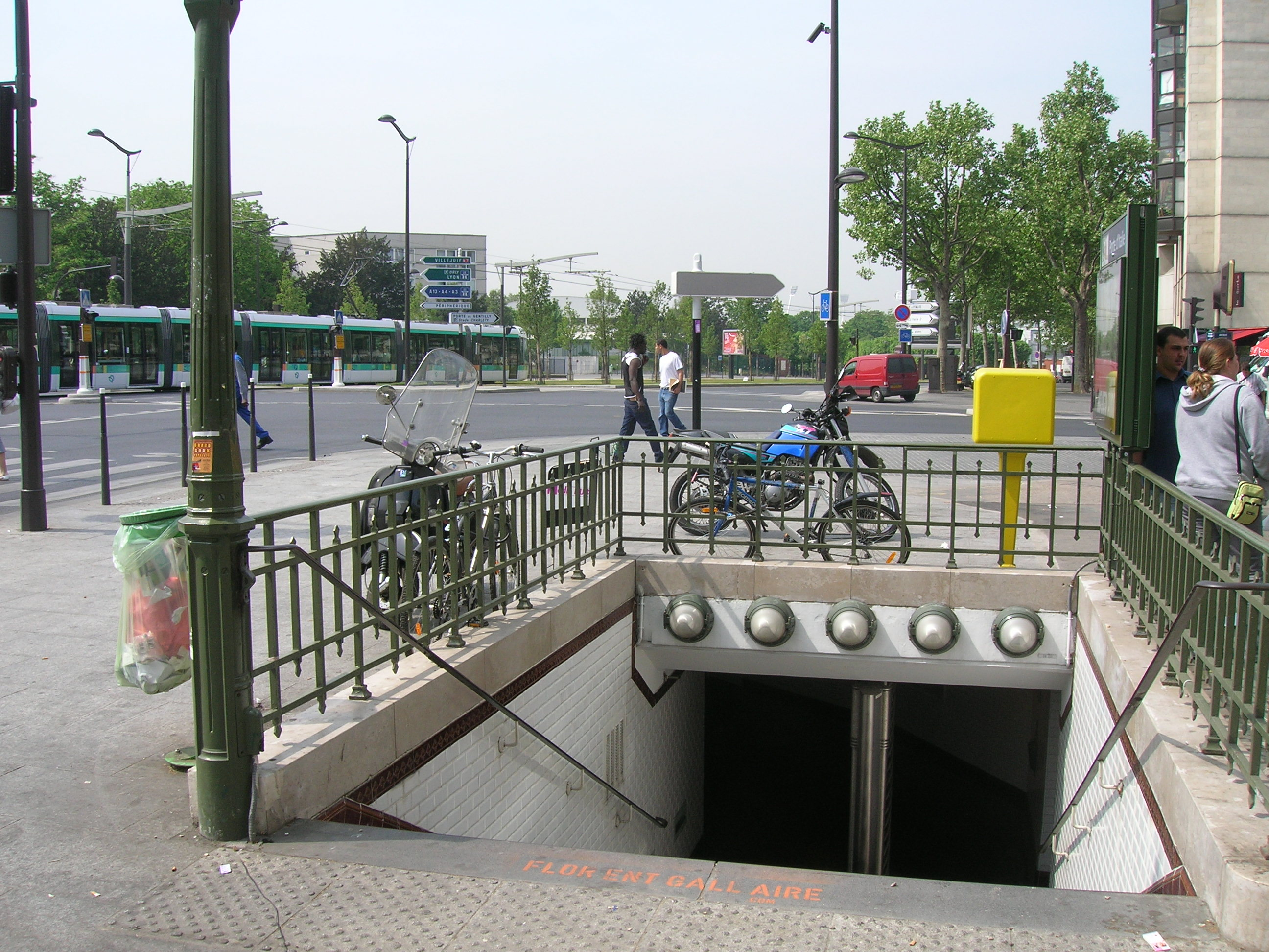 Accès de la station de métro Porte d'Italie, ligne 7, Paris